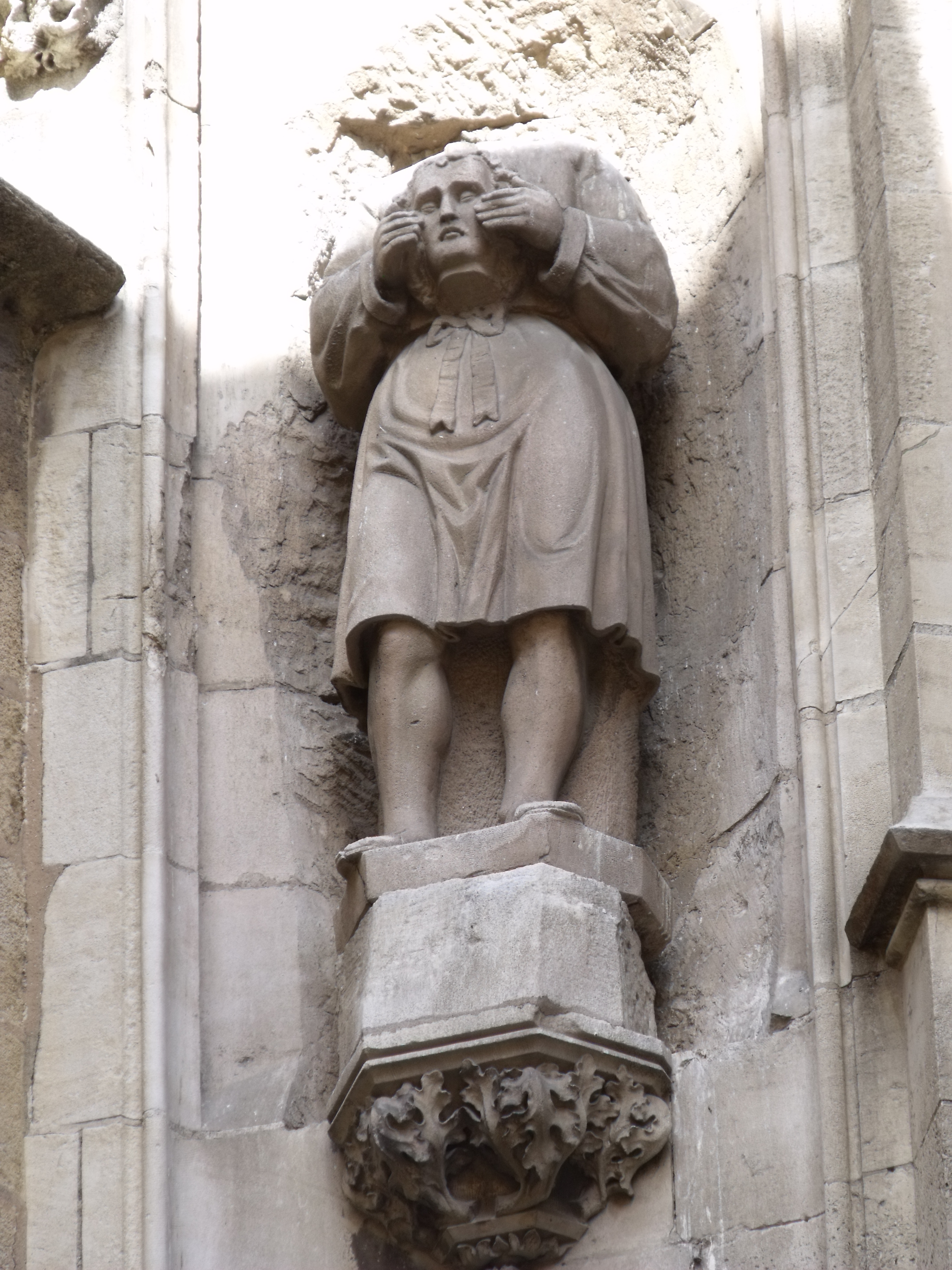 Statue de saint Mitre, cathédrale Saint-Sauveur. Aix-en-Provence.